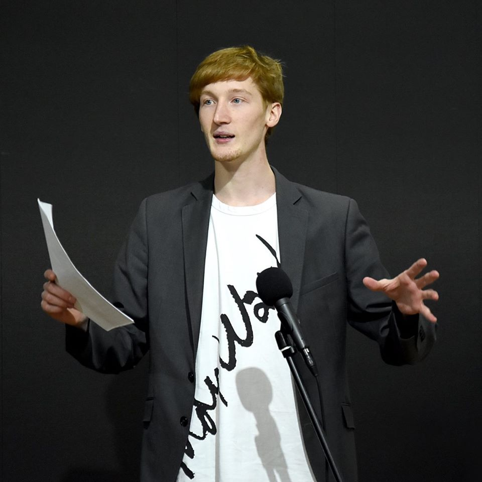 Spisovatel a fotograf Marek Hnila v roce 2018